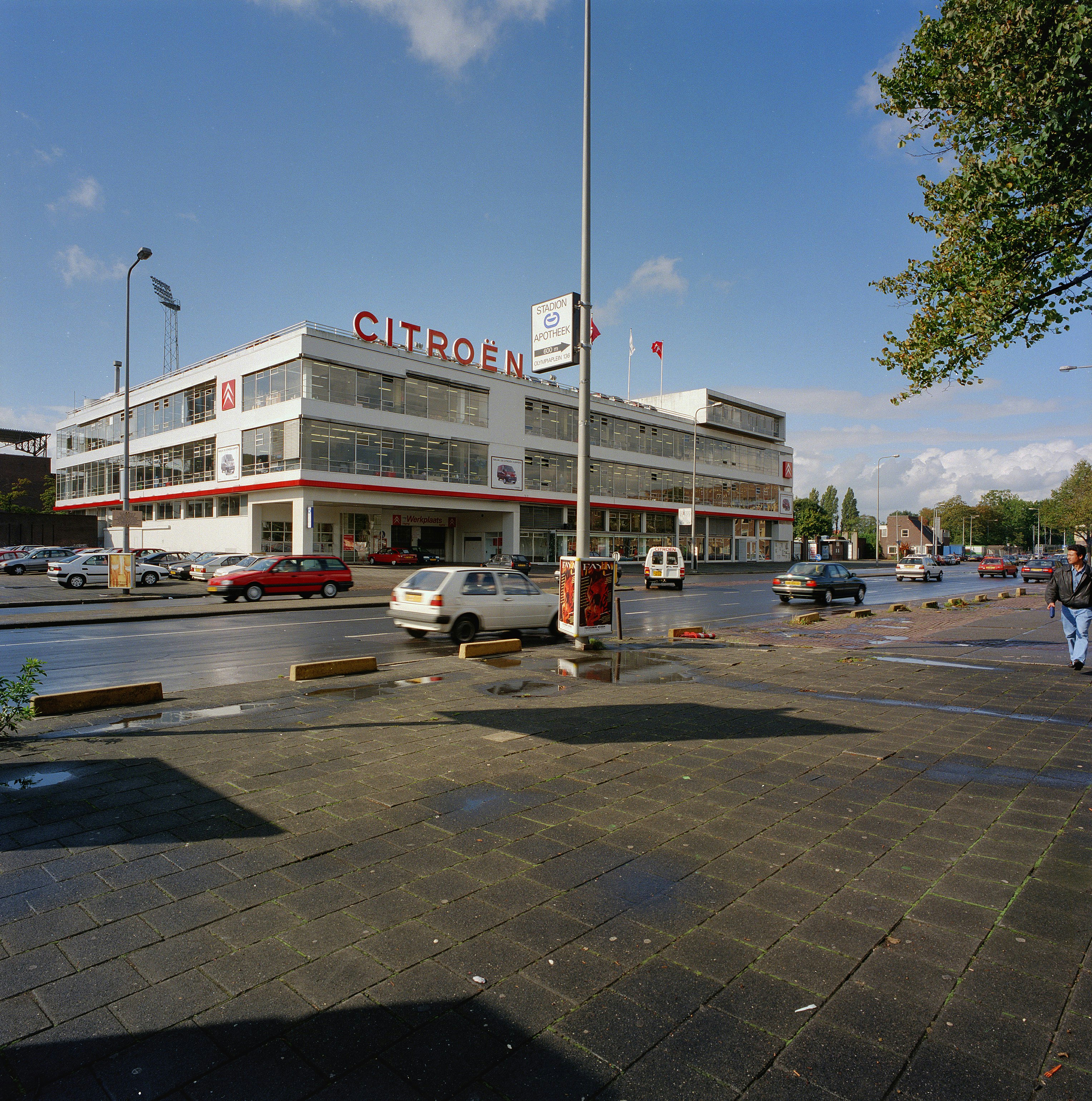 Citroëngarage: Exterieur OVERZICHT OMGEVING VAN HET STADION